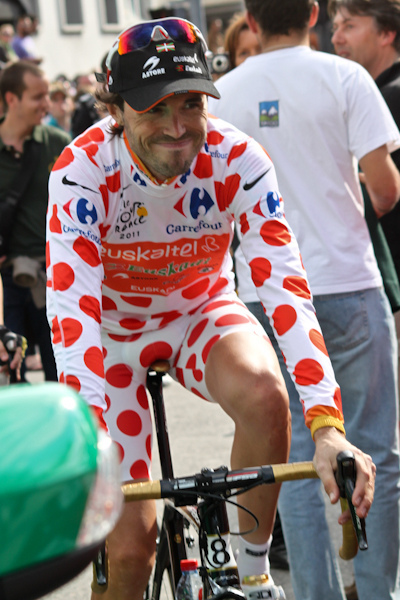 Samu Sánchez, ganador del maillot de la montaña del Tour de Francia 2011